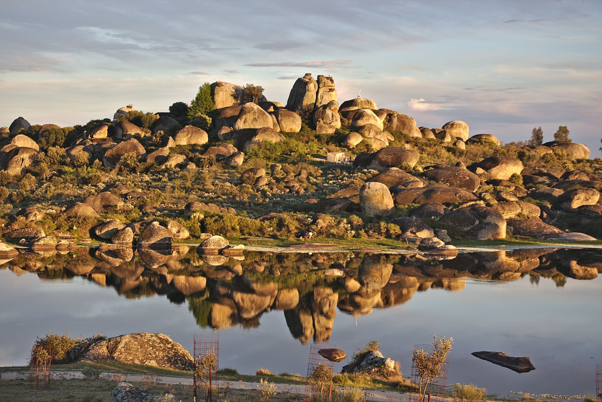 Imagen de las Peñas del Tesoro a orillas del Charco del Barrueco de Abajo.